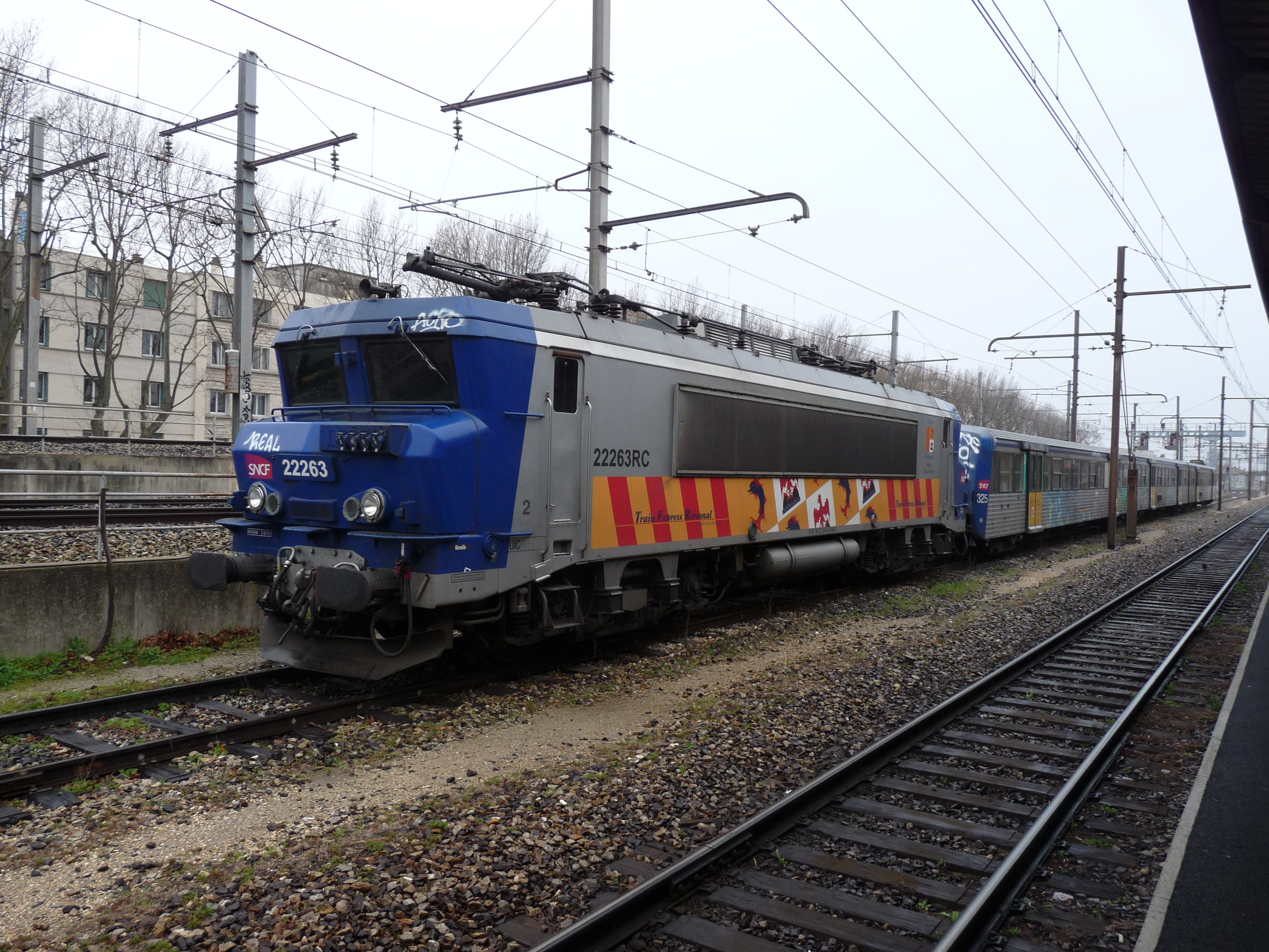 Getrokken TER trein in Avignon-Centre